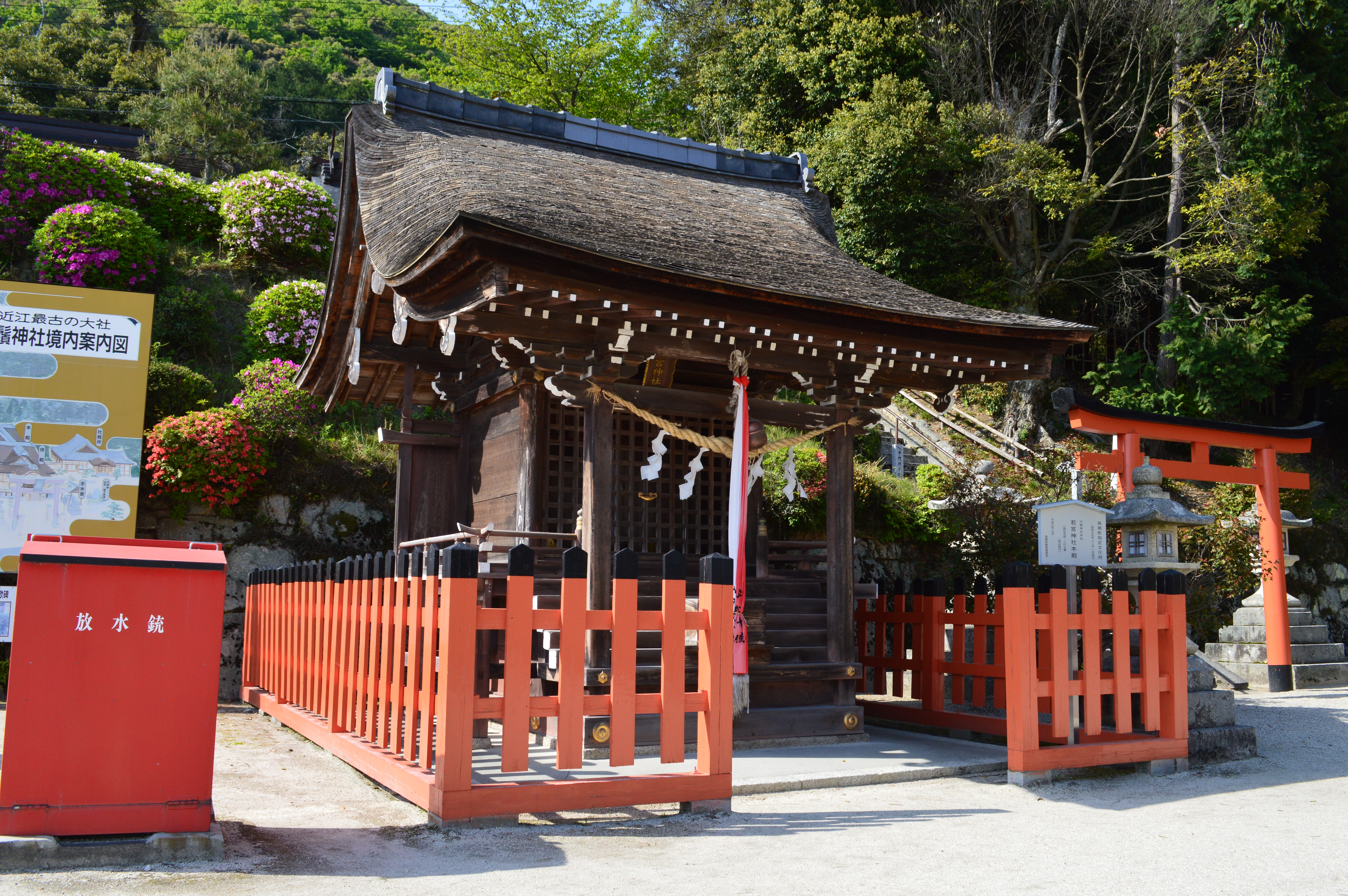 白鬚神社 (高島市) 境内若宮社